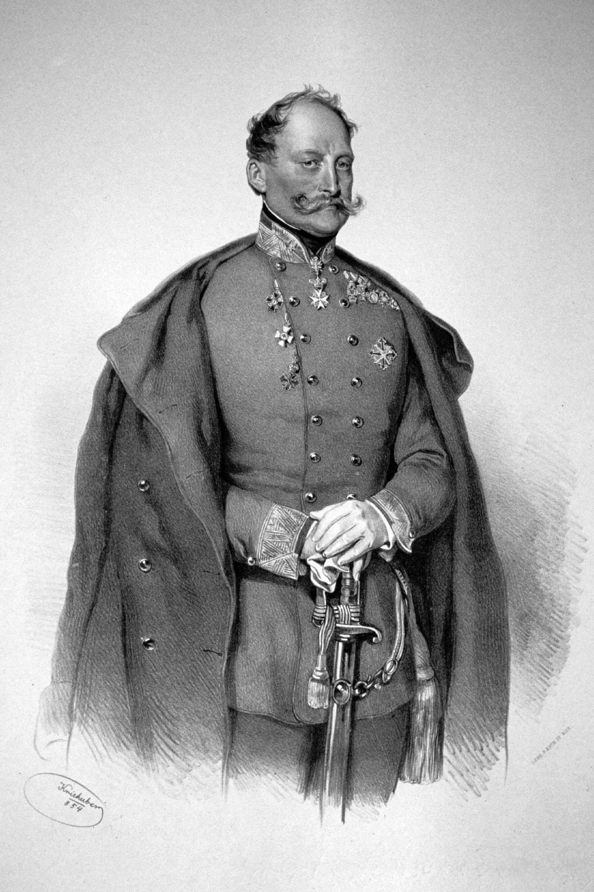 Friedrich Karl Fürst Schwarzenberg (1800-1870), k. k. Generalmajor, Schriftsteller.